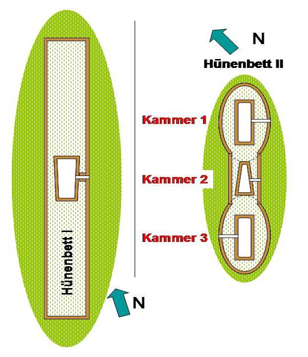 Kleinenkneten